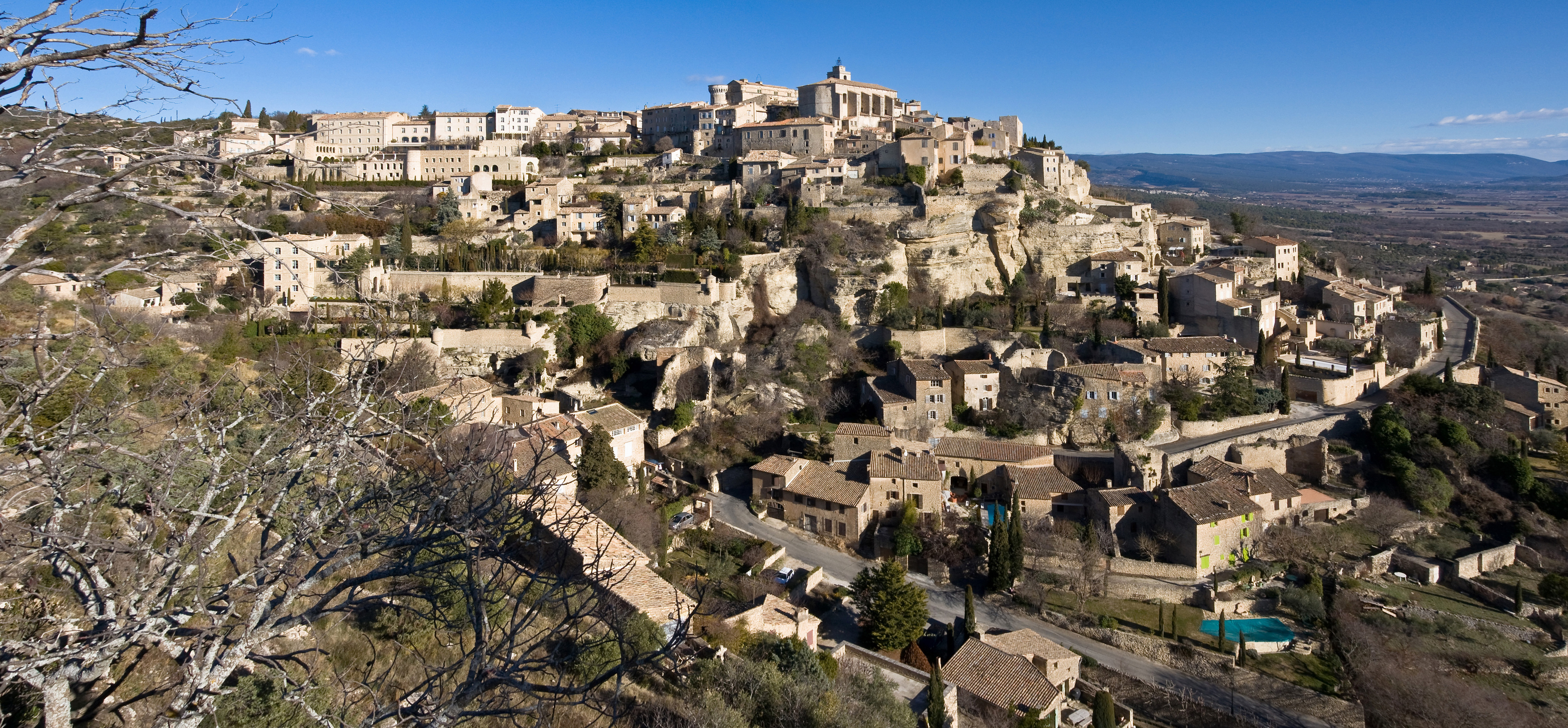 Village de Gordes, dans le Vaucluse